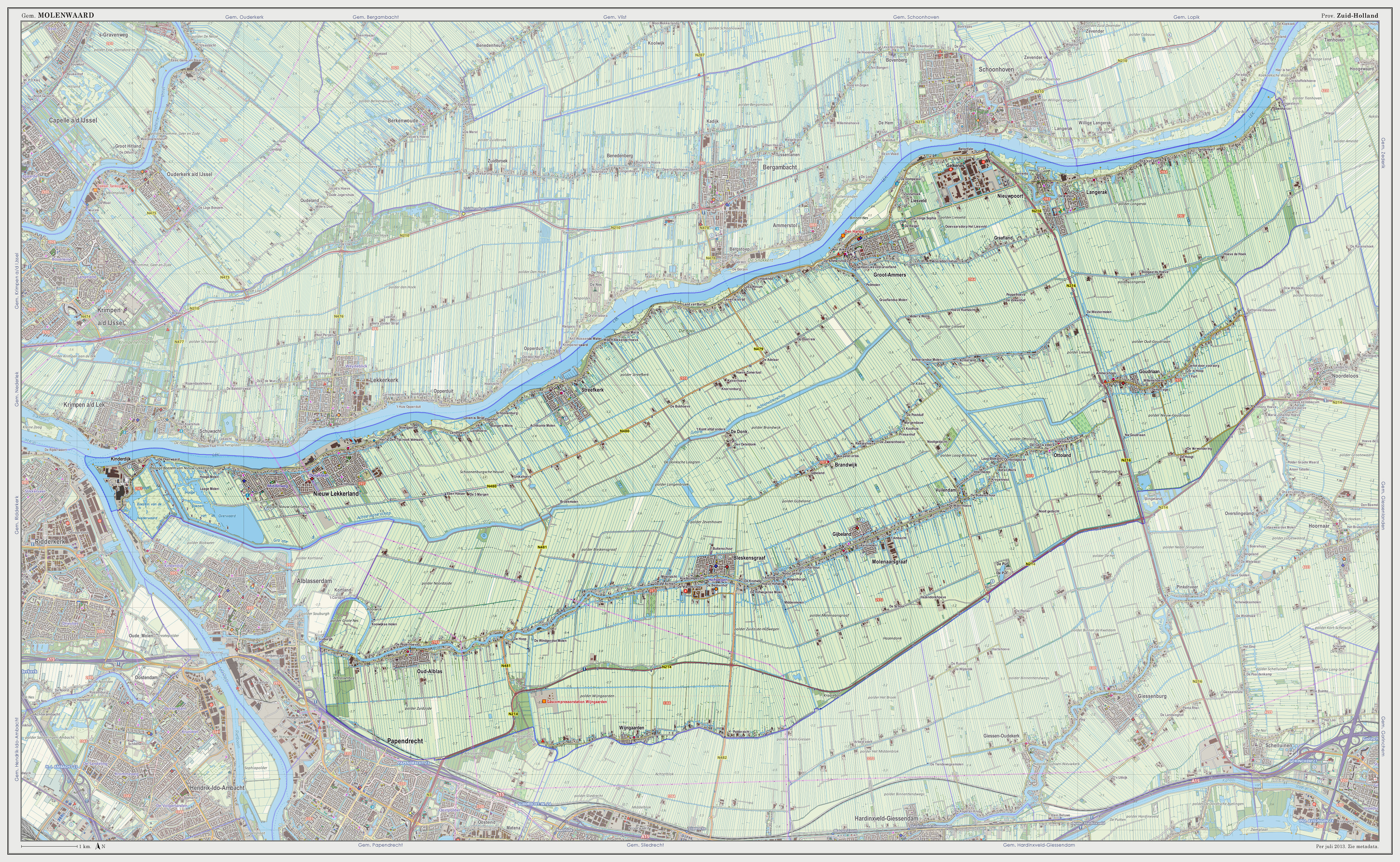 Topografische kaart van gemeente Molenwaard (2013). Samengesteld door Jan-Willem van Aalst op basis van de GML open geodata van de BRT/Top10NL (basisregistratie Topografie, Kadaster 2011), vrijgegeven door Kadaster onder de Creative Commons BY licentie. Additionele gegevens uit BAG (8 juli 2013), uit de Open Street Map (9 juli 2013) en uit de Risicokaart. Peildatum kaartbeeld: 9 juli 2013. Zie ook Gemeentenatlas.nl Samenstelling en kleurenschema: Jan-Willem van Aalst, met QuantumGIS en Photoshop. Zie ook de Legenda.